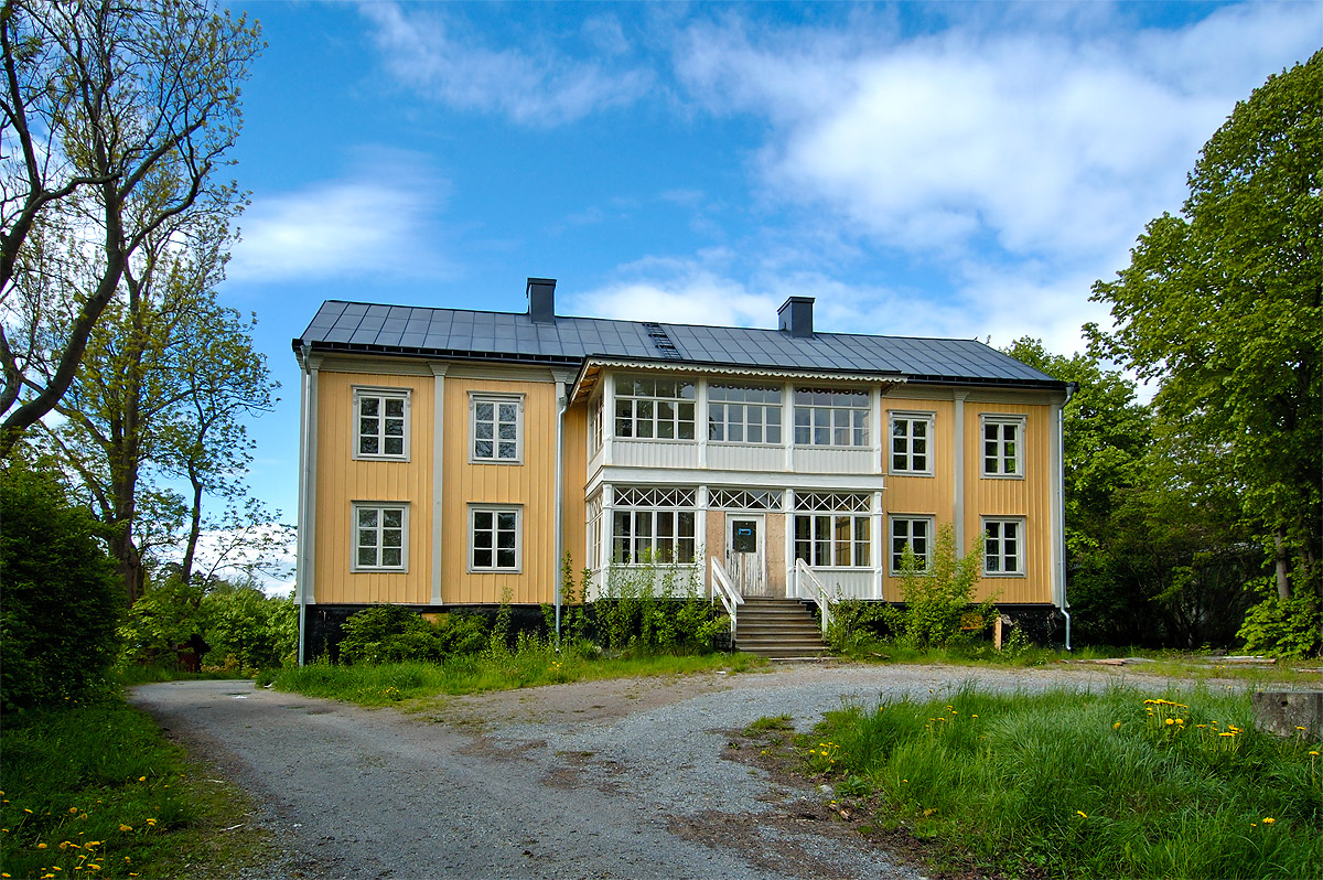 Bällsta gård i Mariehäll i nordvästra Stockholm